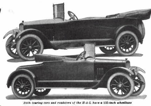 1917 H.A.L. Twelve Touring and Roadster